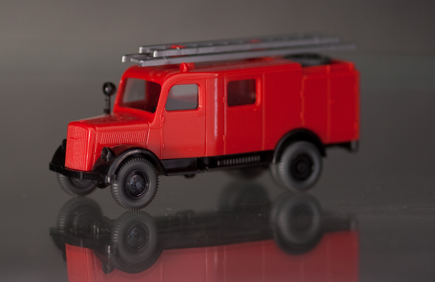 Wiking Modell eines Löschfahrzeuges